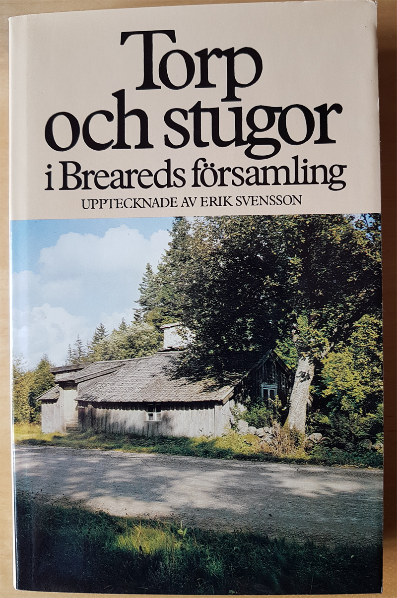 Boken "Torp och stugor i Breareds församling" utgiven 1981 av Breareds kulturhistoriska förening i Simlångsdalen